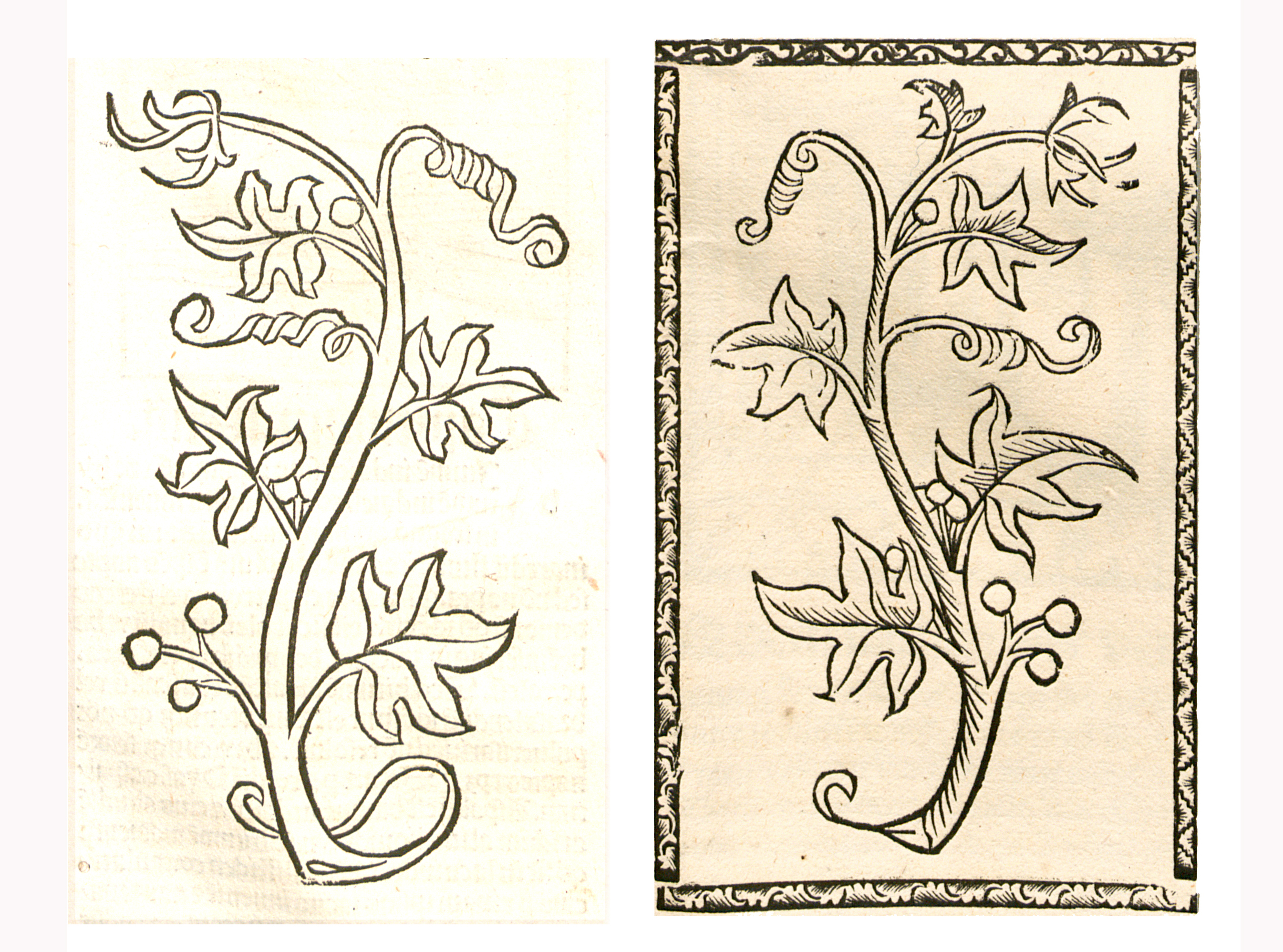 Abbildung von Zytwan (Bryonia)